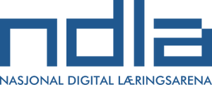 Nasjonal digital læringsarena sin logo fra 2018